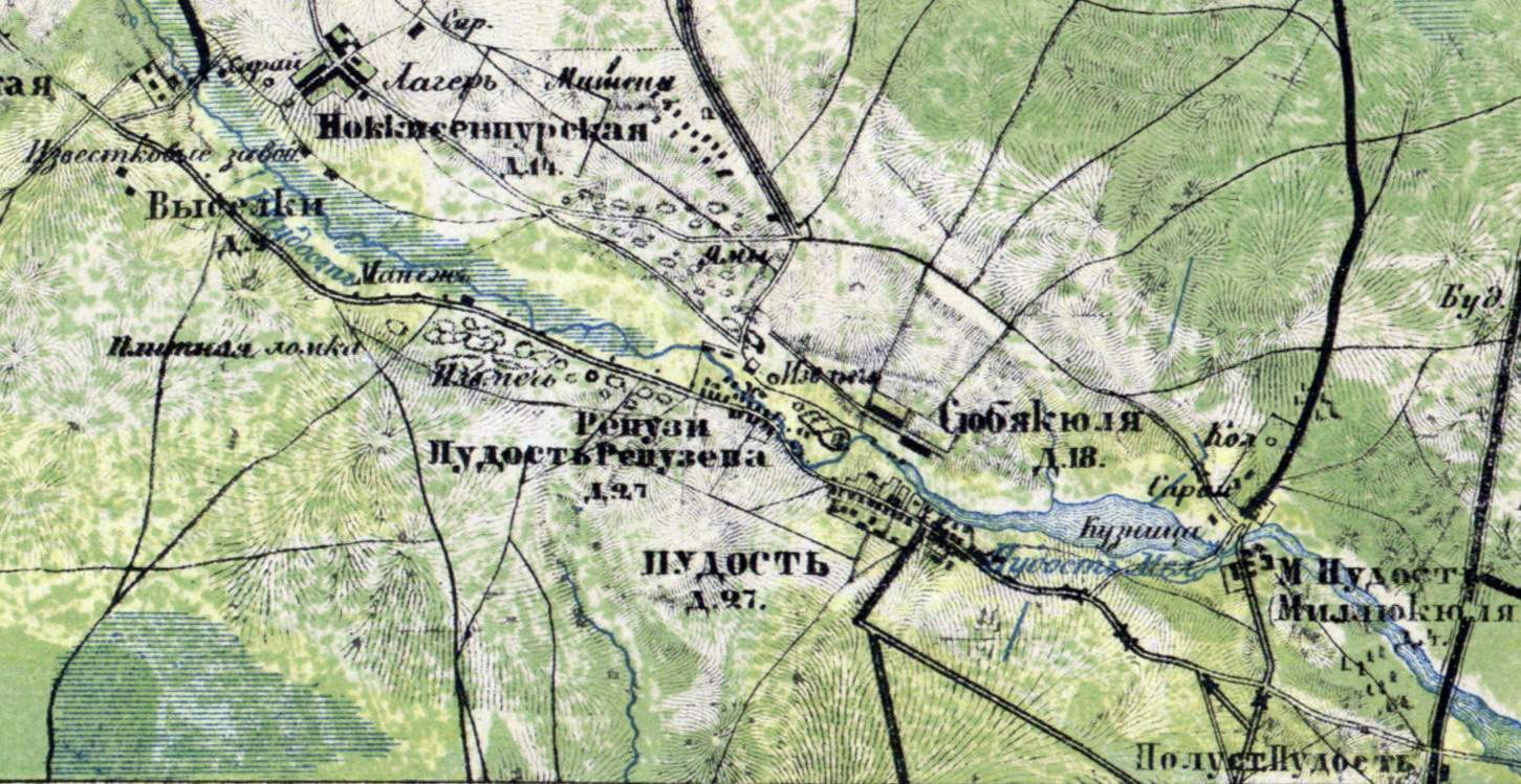 Фрагмент дореволюционной карты с изображением территории современного посёлка Пудость